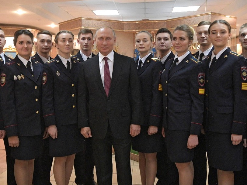 В ходе посещения Московского университета МВД России имени В.Я.Кикотя.